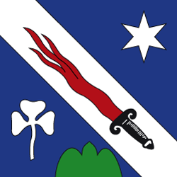 Flagge von Erschmatt